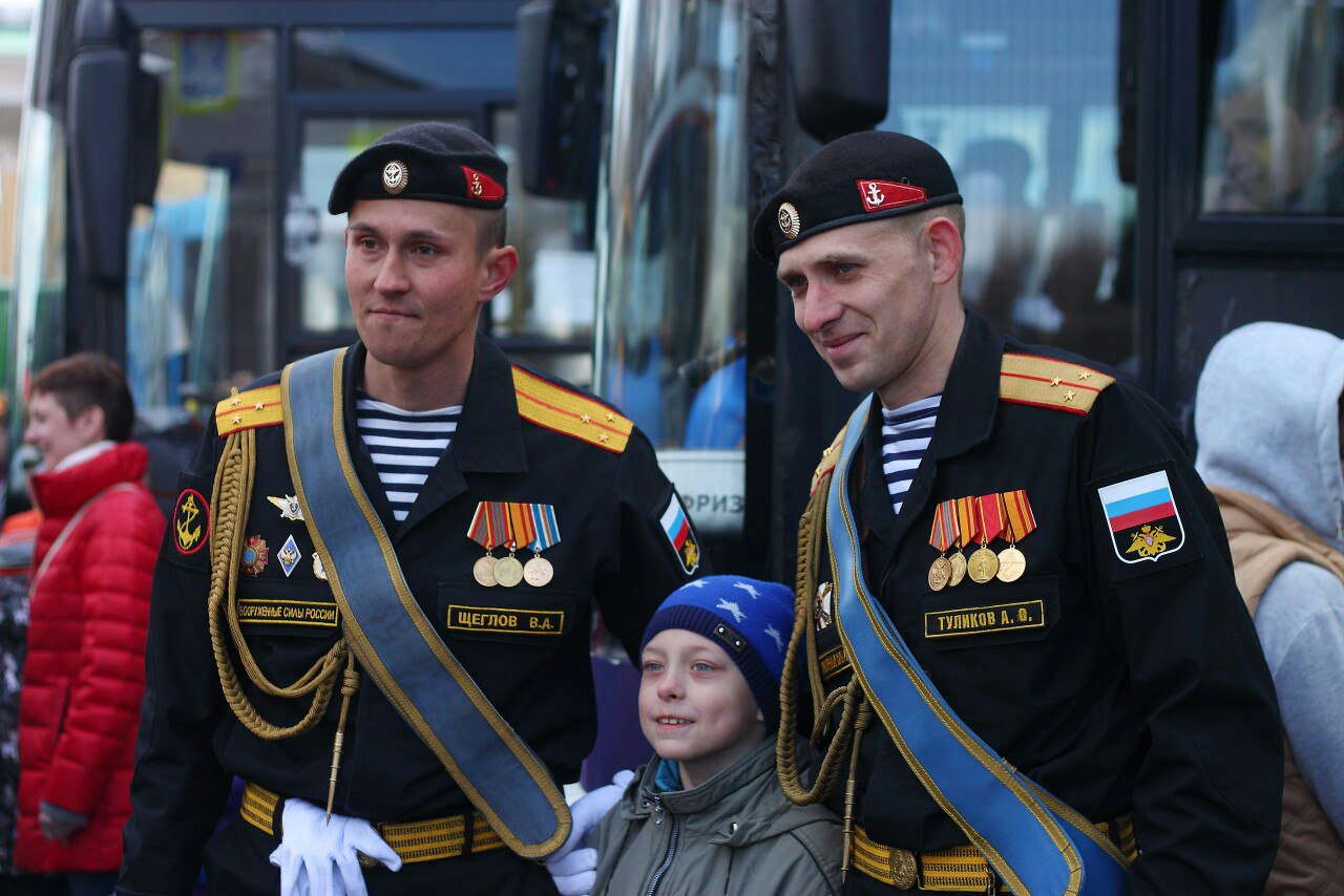 День Победы в Петербурге. Морские пехотинцы с ребенком